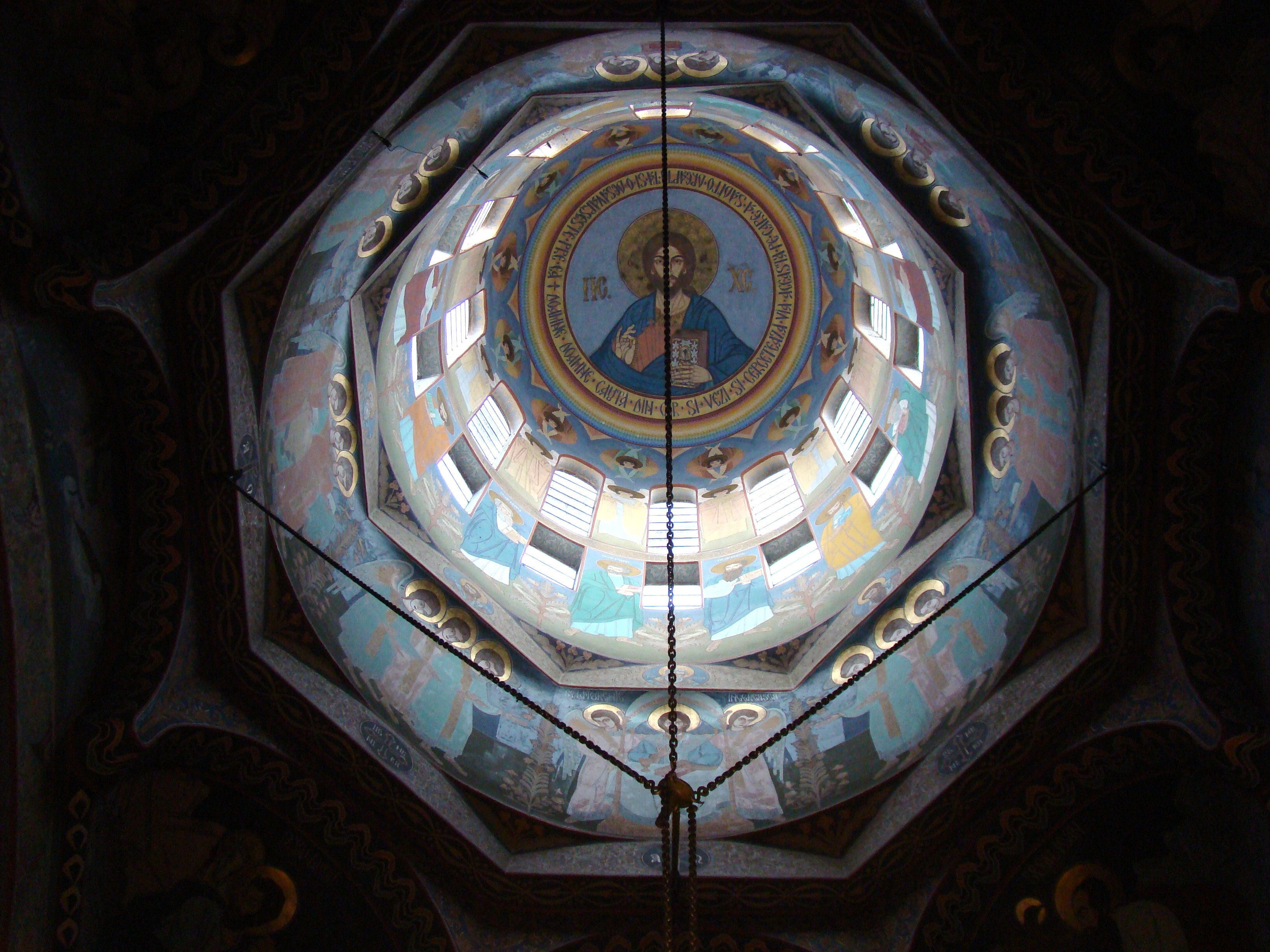 Biserica "Sf. Gheorghe", municipiul Curtea de Argeș, Bd. Basarabilor 91